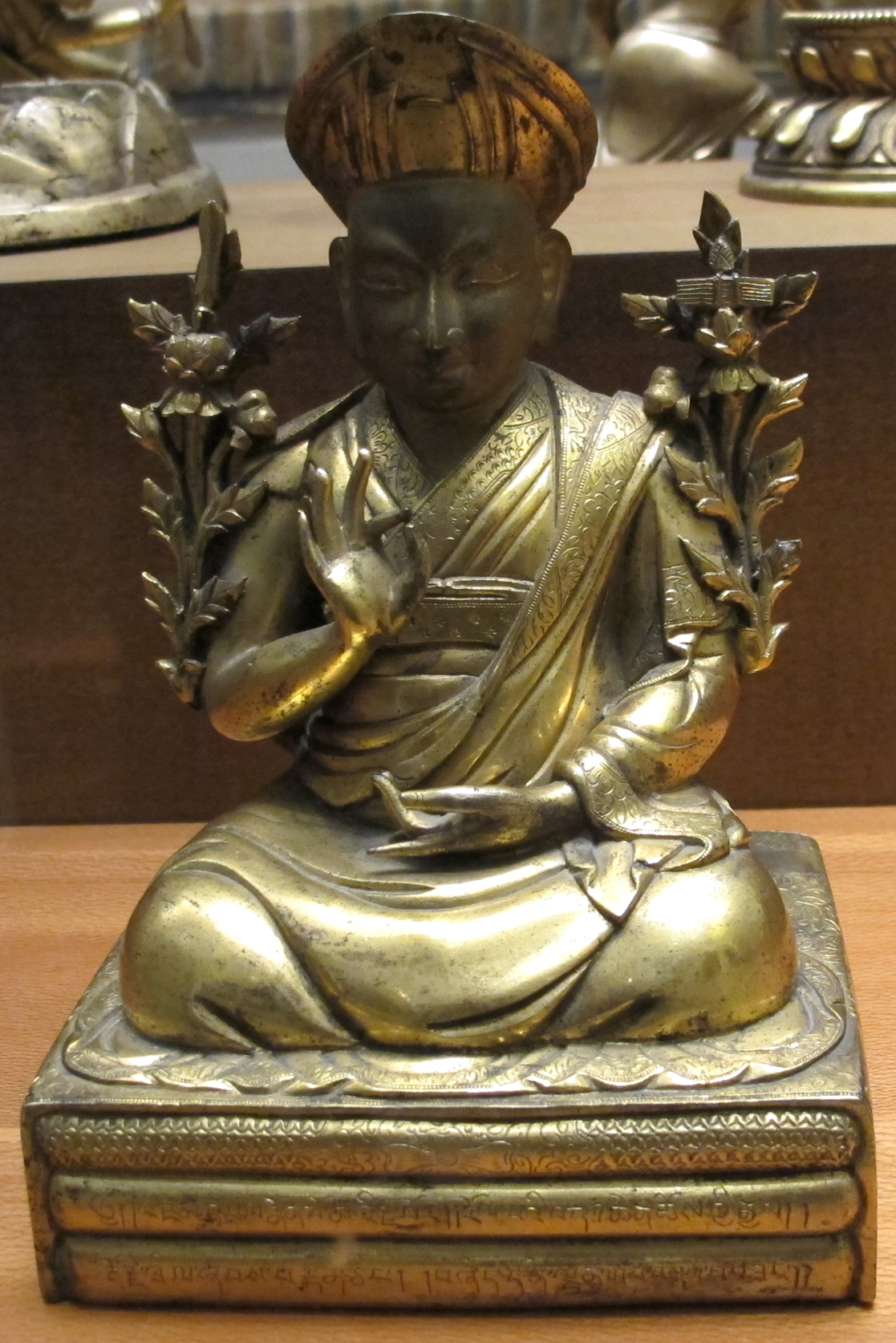 Arte sino-tibetana, ICang-skya rol-pa'i rdo-rje, II grande lama di pechino, xviii sec